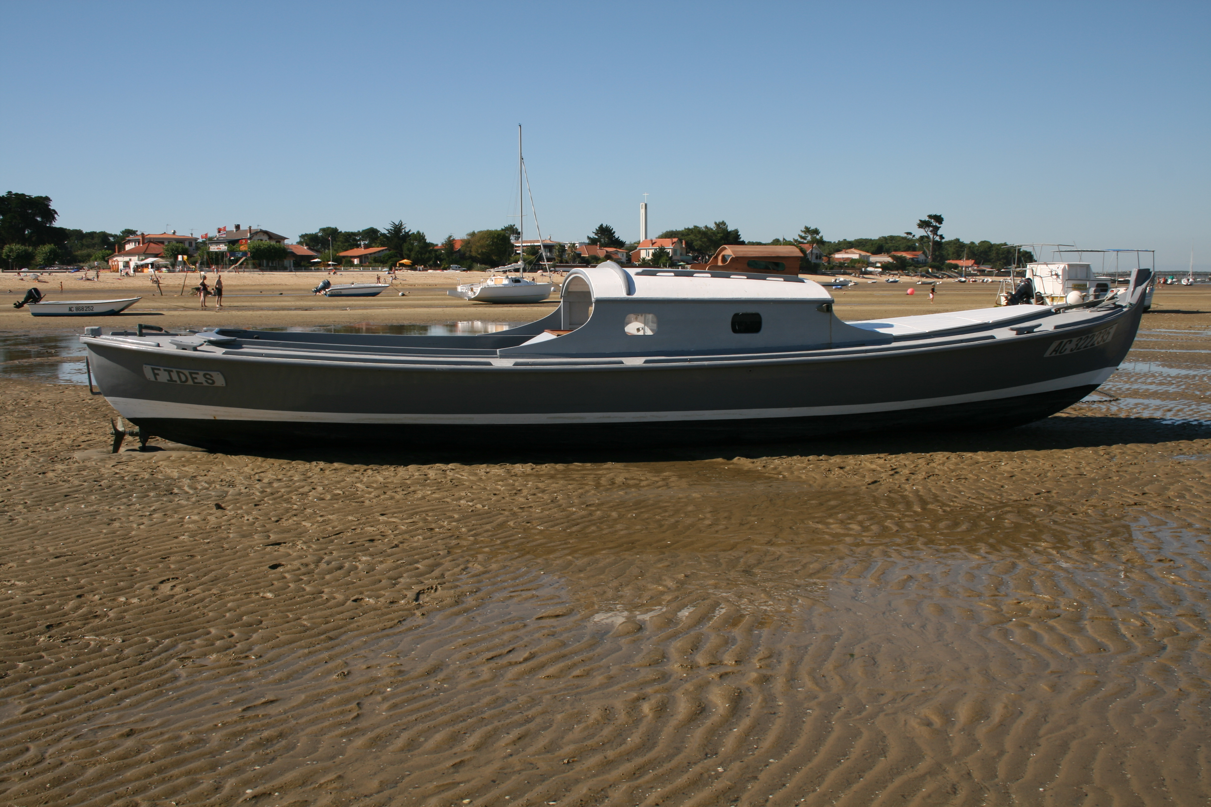 Cap-Ferret Pinasse